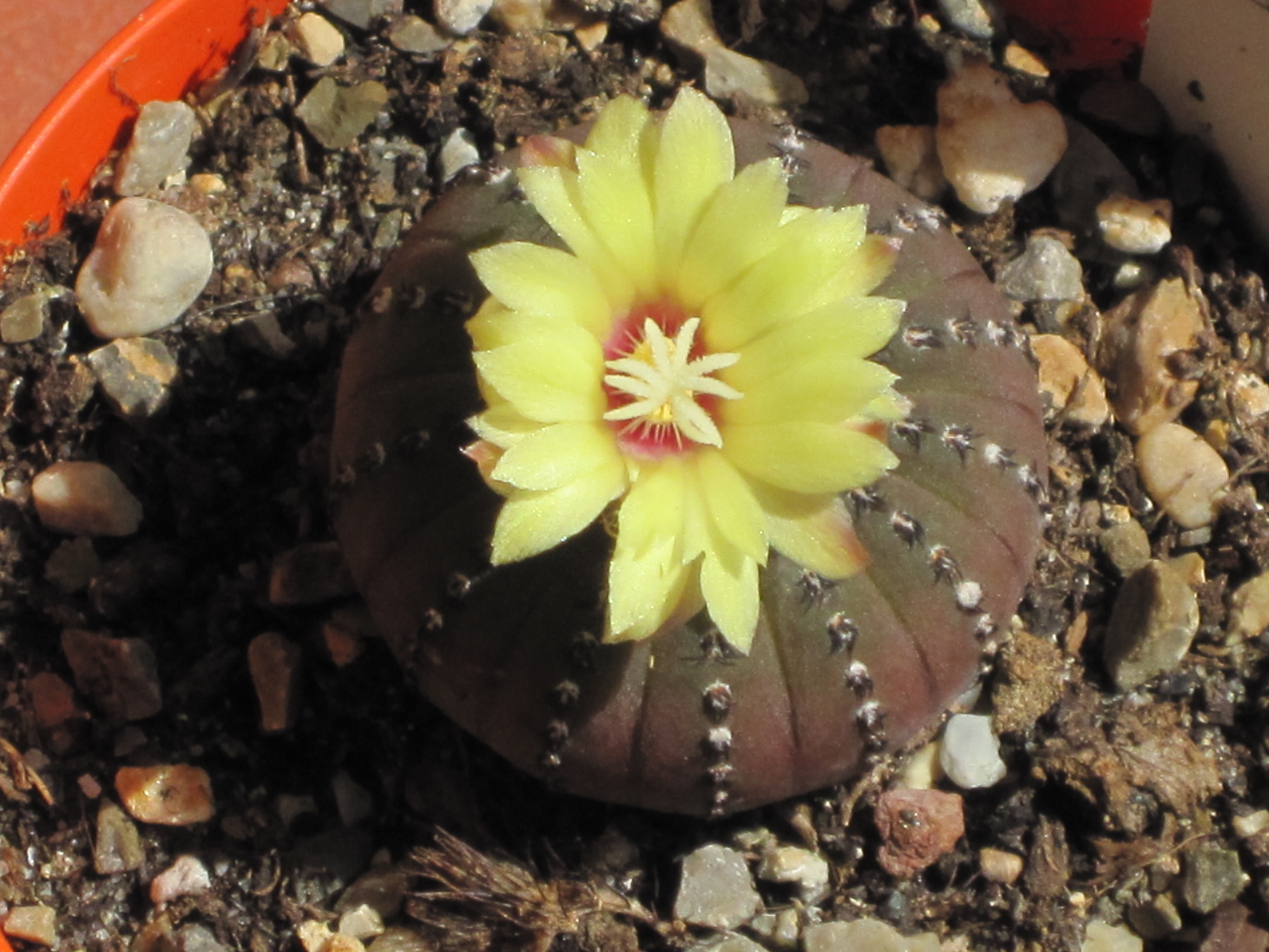 Frailea castanea in fioritura